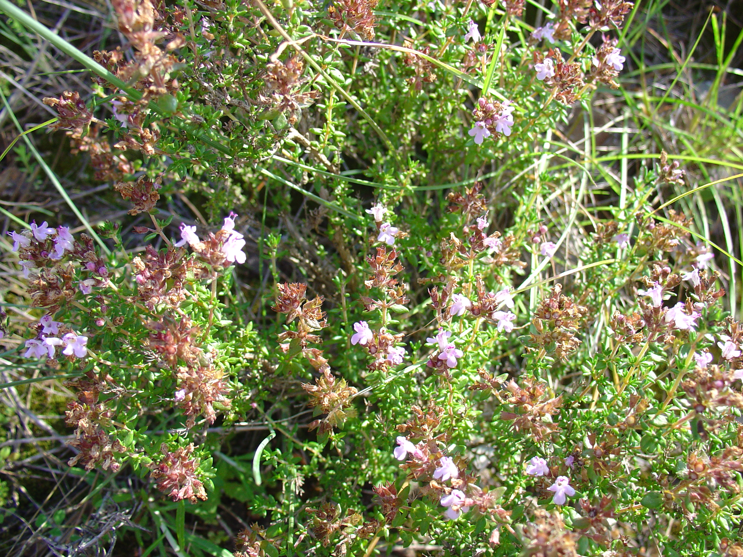 Thymus hyemalis procedente de margen de camino en Sierra Minera, Murcia, Spain